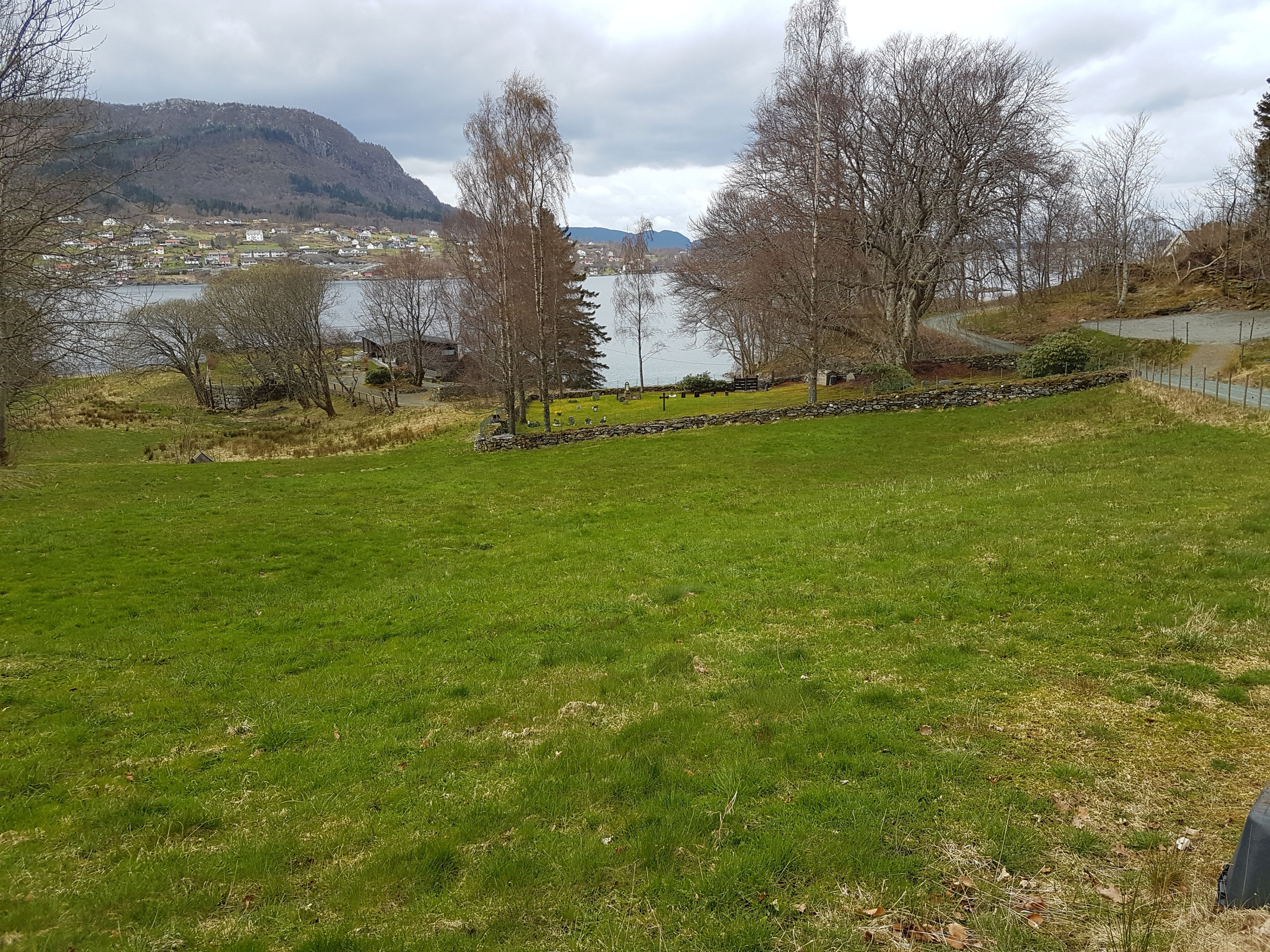 Tysnes gamle kirkested. Foto: Roger Grimelid. Fra Riksantikvarens Kulturminnesøk.